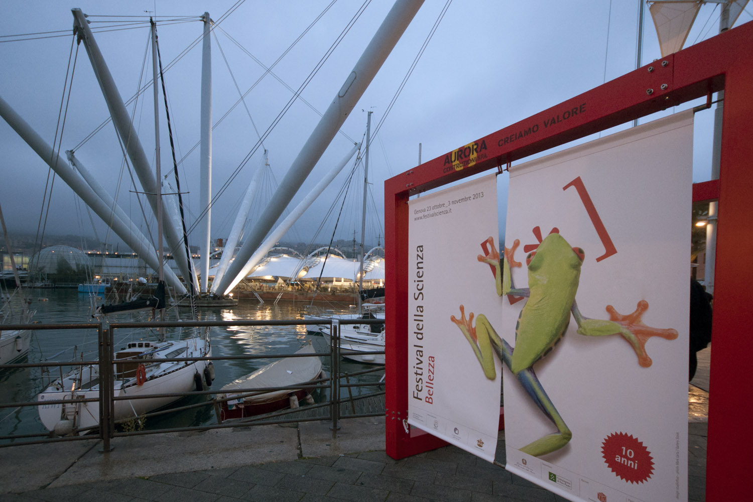 Manifesto del Festival della scienza 2013 e sullo sfondo il Bigo – Italia.